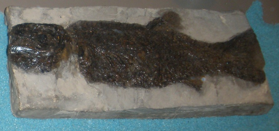 Fossil of Callopterus, an extinct fish Took the photo at Musee d'Histoire Naturelle, Brussels